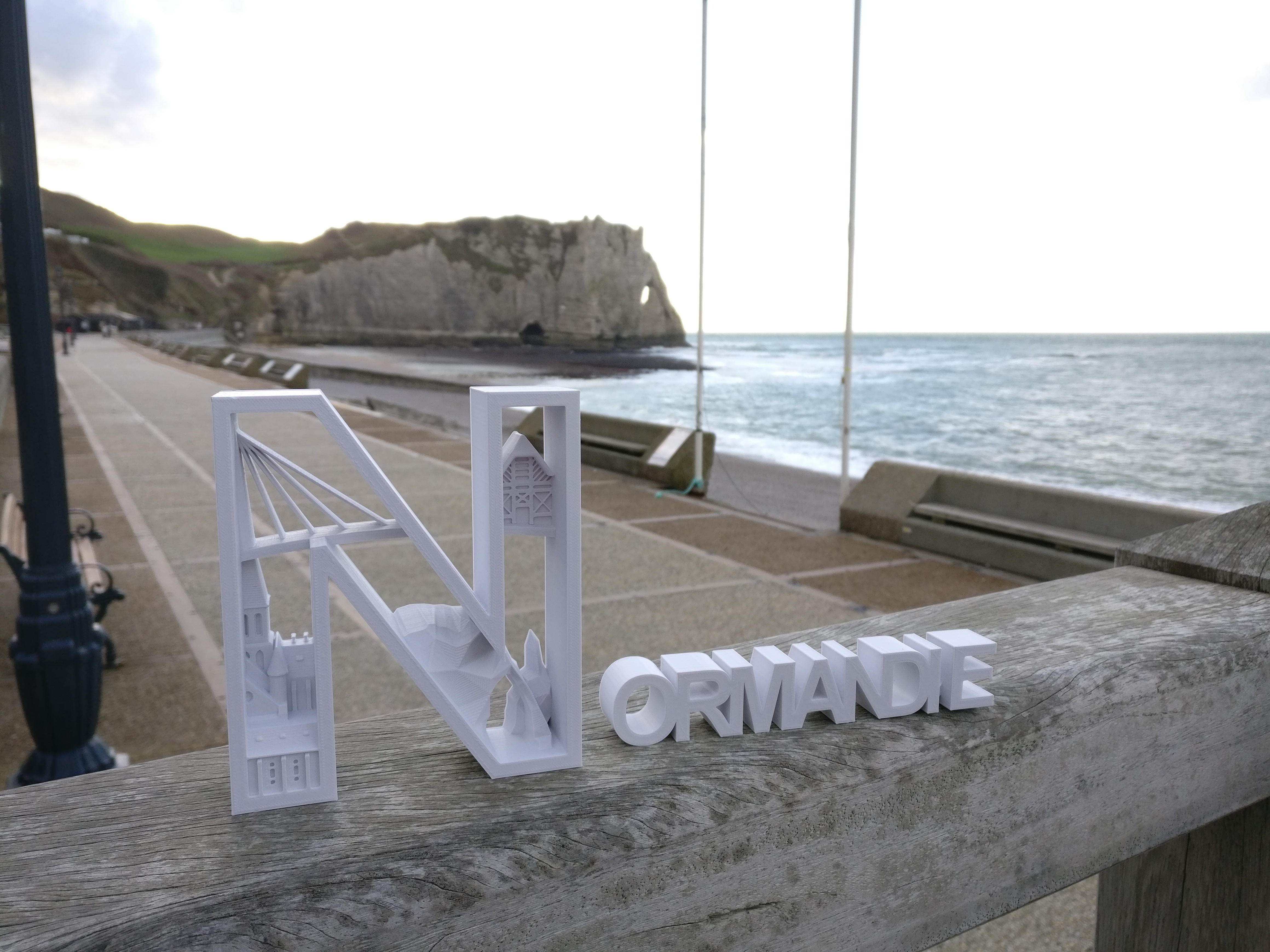 Oeuvre Normandie par Letter IN en impression 3D.